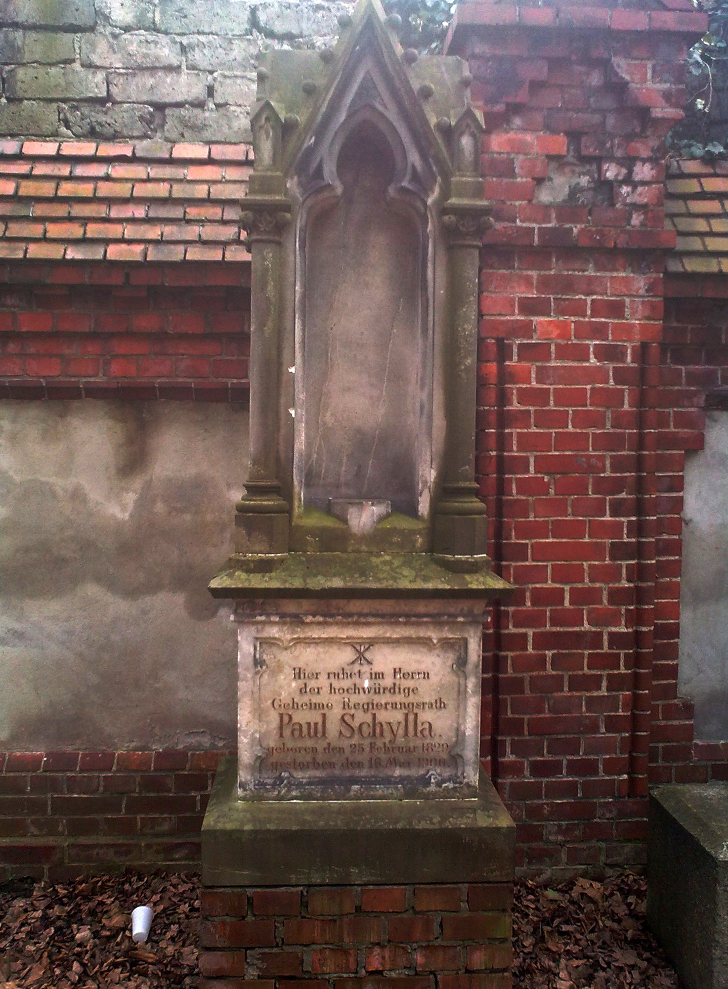 Pomnik na cmentarzu, przy ul. Wrocławskiej w Opolu